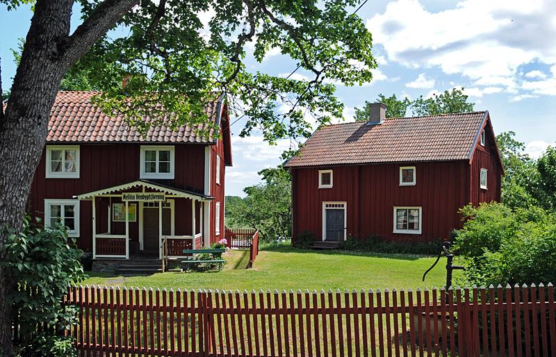 Mellösa Hembygdsförening